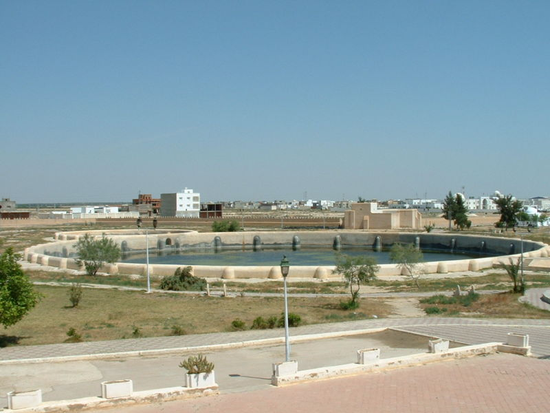 Photographie personnelle prise à Kairouan (Tunisie). Vue d'un des deux bassins des Aghlabides